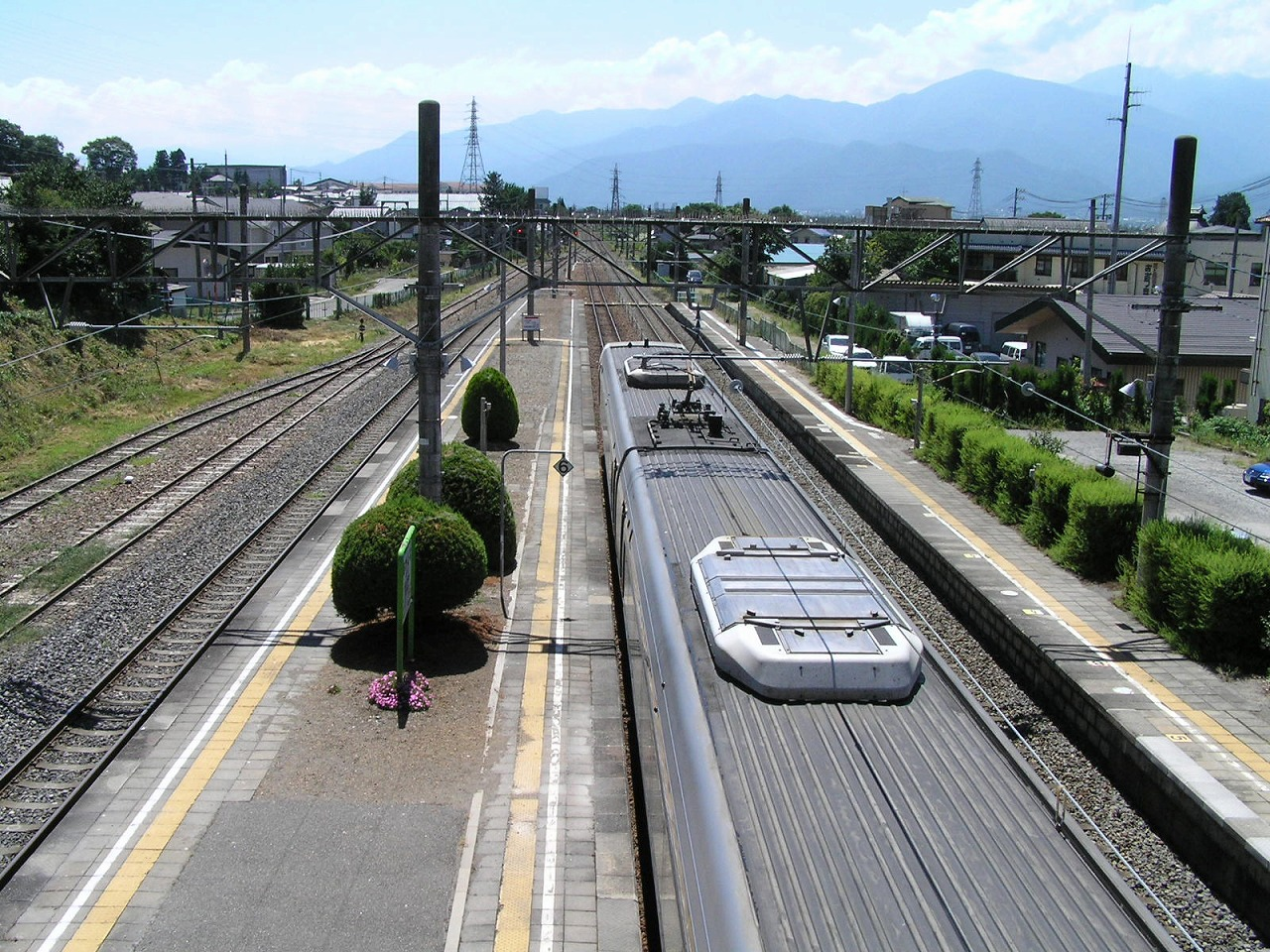 東日本旅客鉄道（JR東日本）篠ノ井線 明科駅ホーム